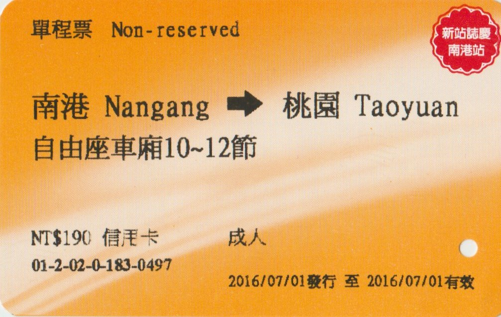 台灣高鐵南港至桃園站自由座車票(2016年7月1日南港站啟用當日)